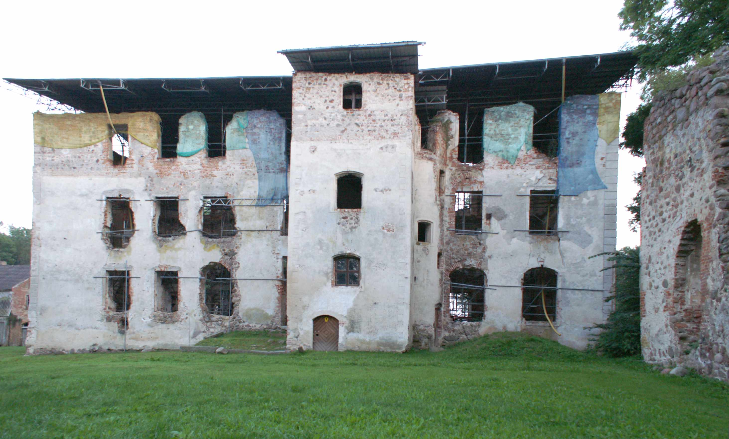 Putzar - Landkreis Ostvorpommern - Joachimsbau - Nordseite